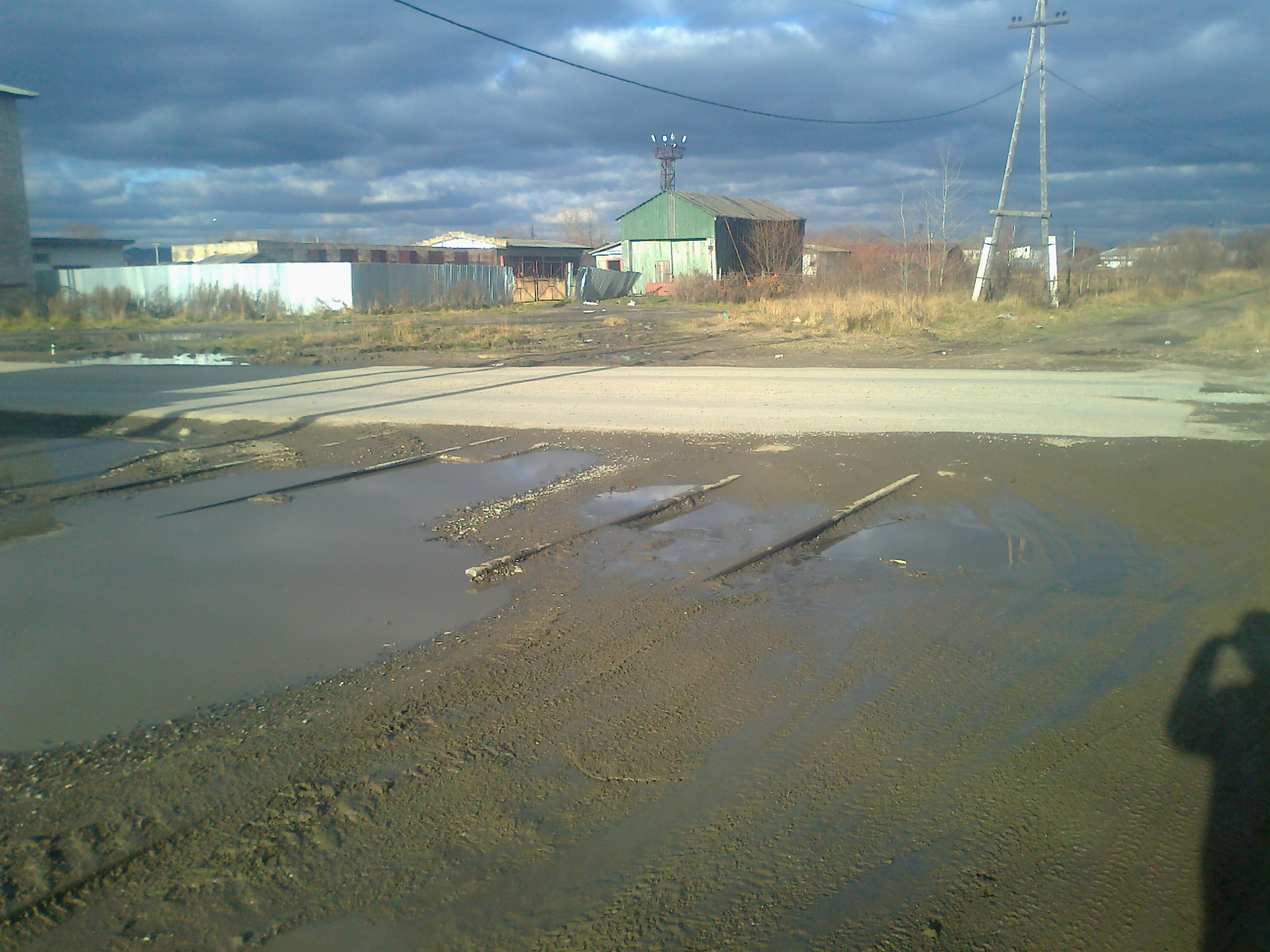 Железнодорожный переезд в городе Анива